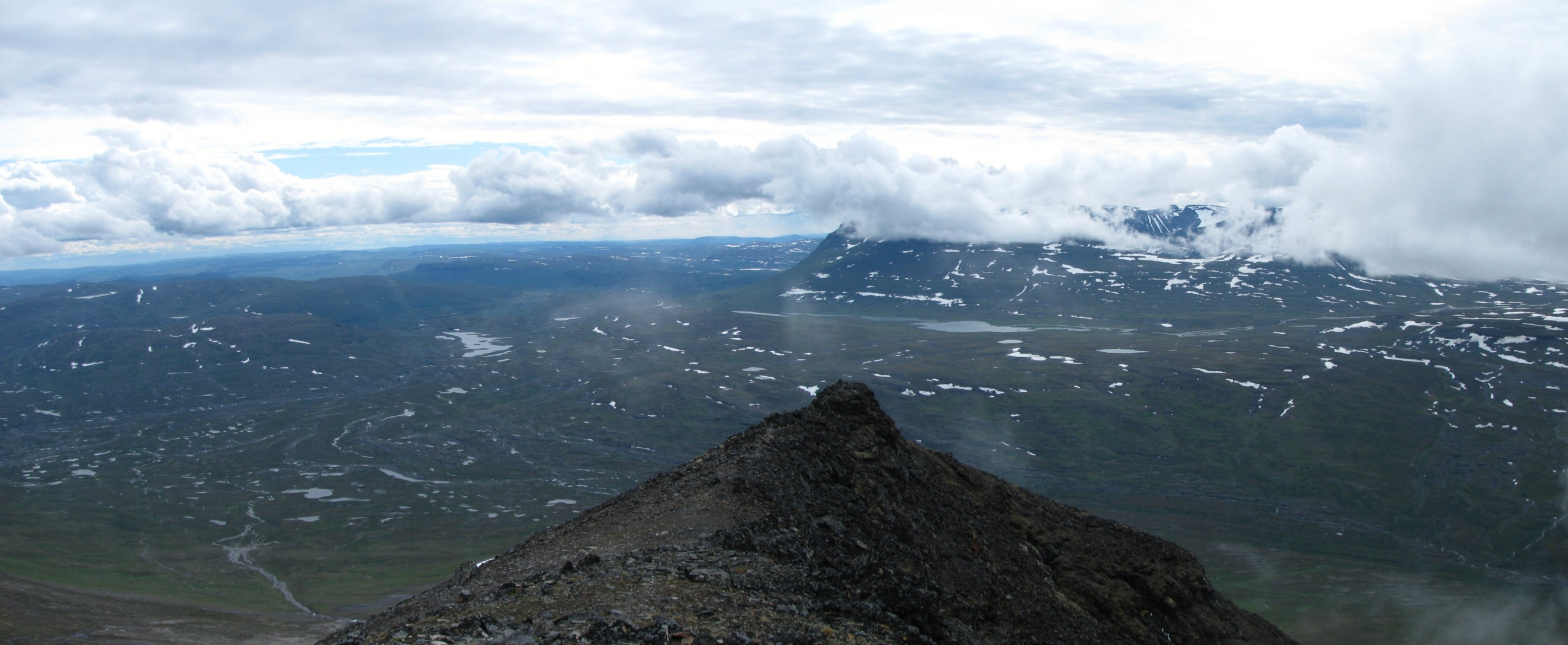 näkymä Paraksen huipulta etelään, keskellä näkyy Pältsan - Moskkugáisin tunturimassiivi.